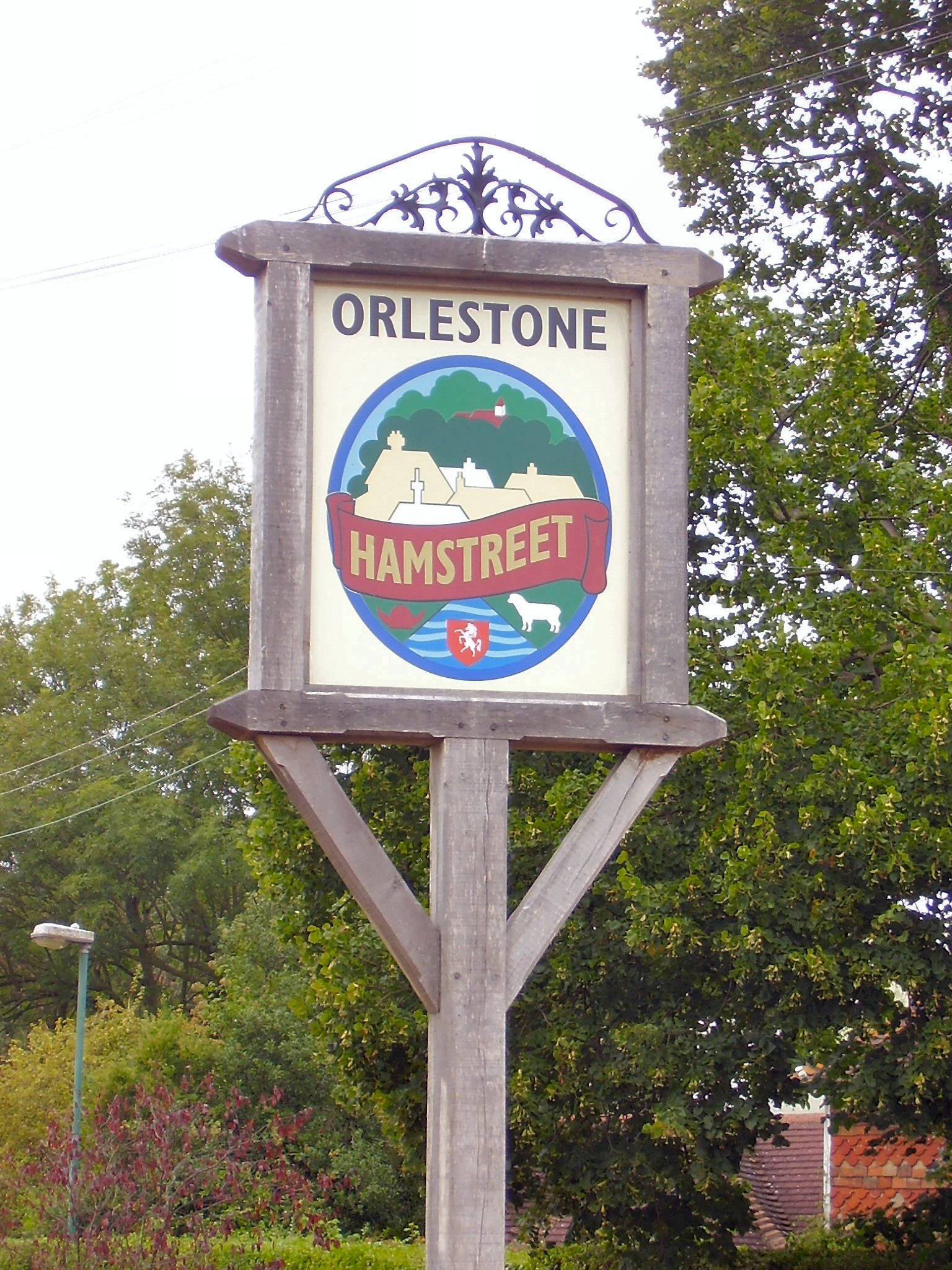 C. Hoyle Hamstreet village centre